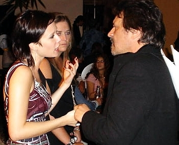 actor Luis Melo actress Mariana Ximenes